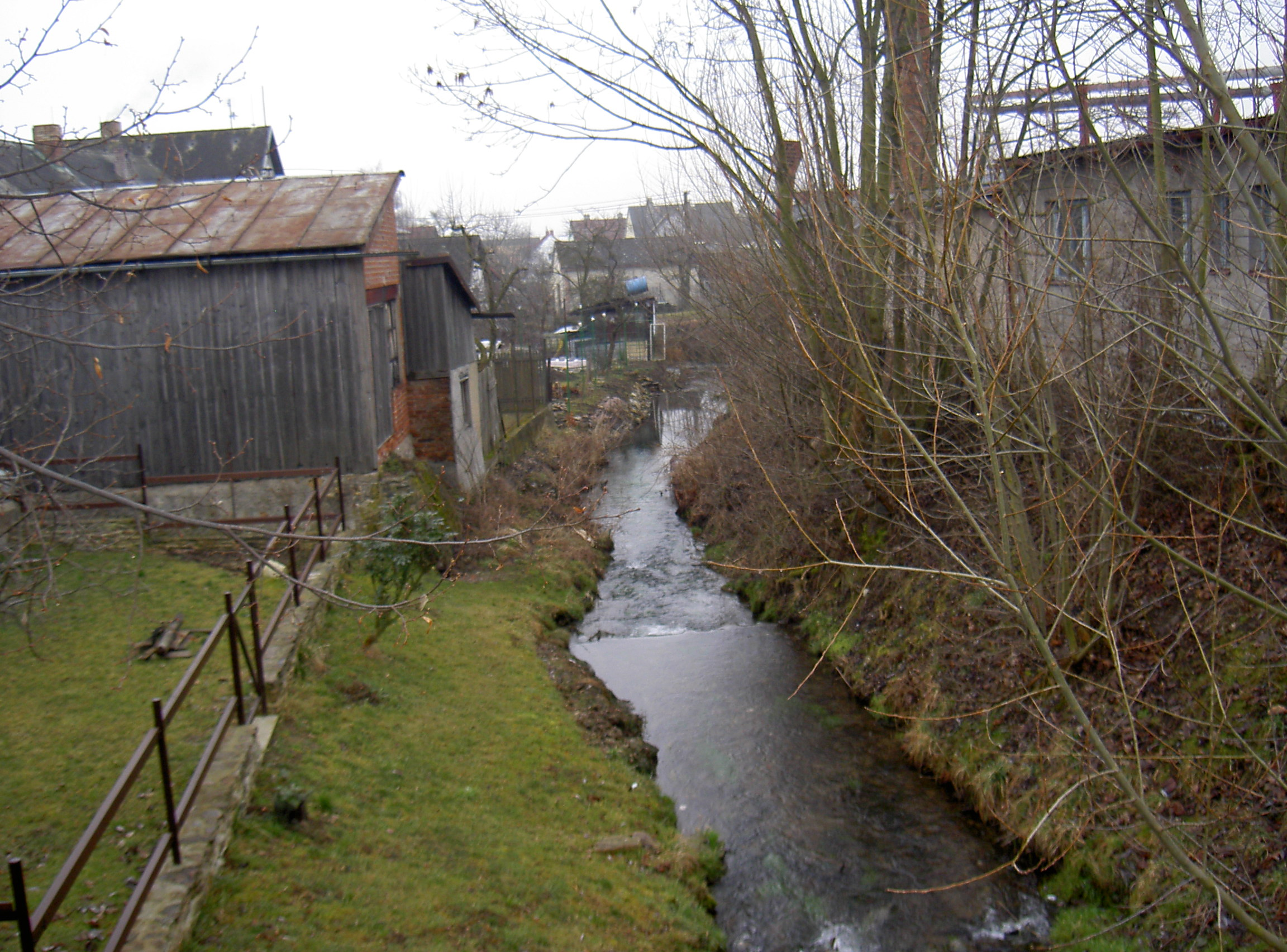 Postřekov, Mlýnecký potok, Grenzbach zwischen Postřekov und Mlýnec